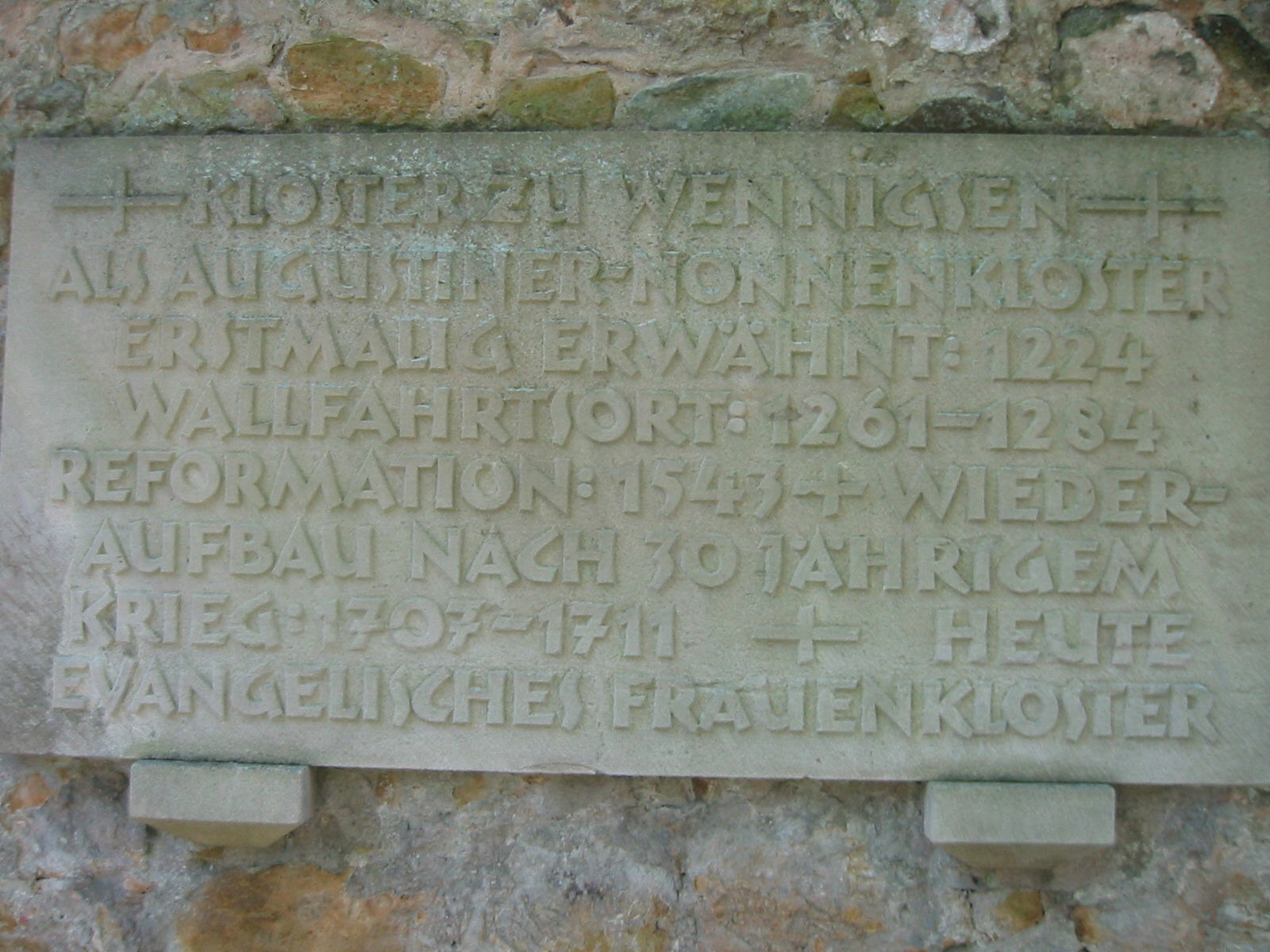 fotografiert am 23.9.2006 Text der Tafel: "KLOSTER ZU WENNIGSEN Als Augustiner-Nonnenkloster erstmalig erwähnt: 1224 Wallfahrtsort: 1261 - 1284 Reformation: 1543 Wiederaufbau nach 30jährigem Krieg: 1707 - 1711 Heute evangelisches Frauenkloster"